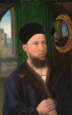 Bildnis des Johann von Melem dem Jüngeren. (-1529)